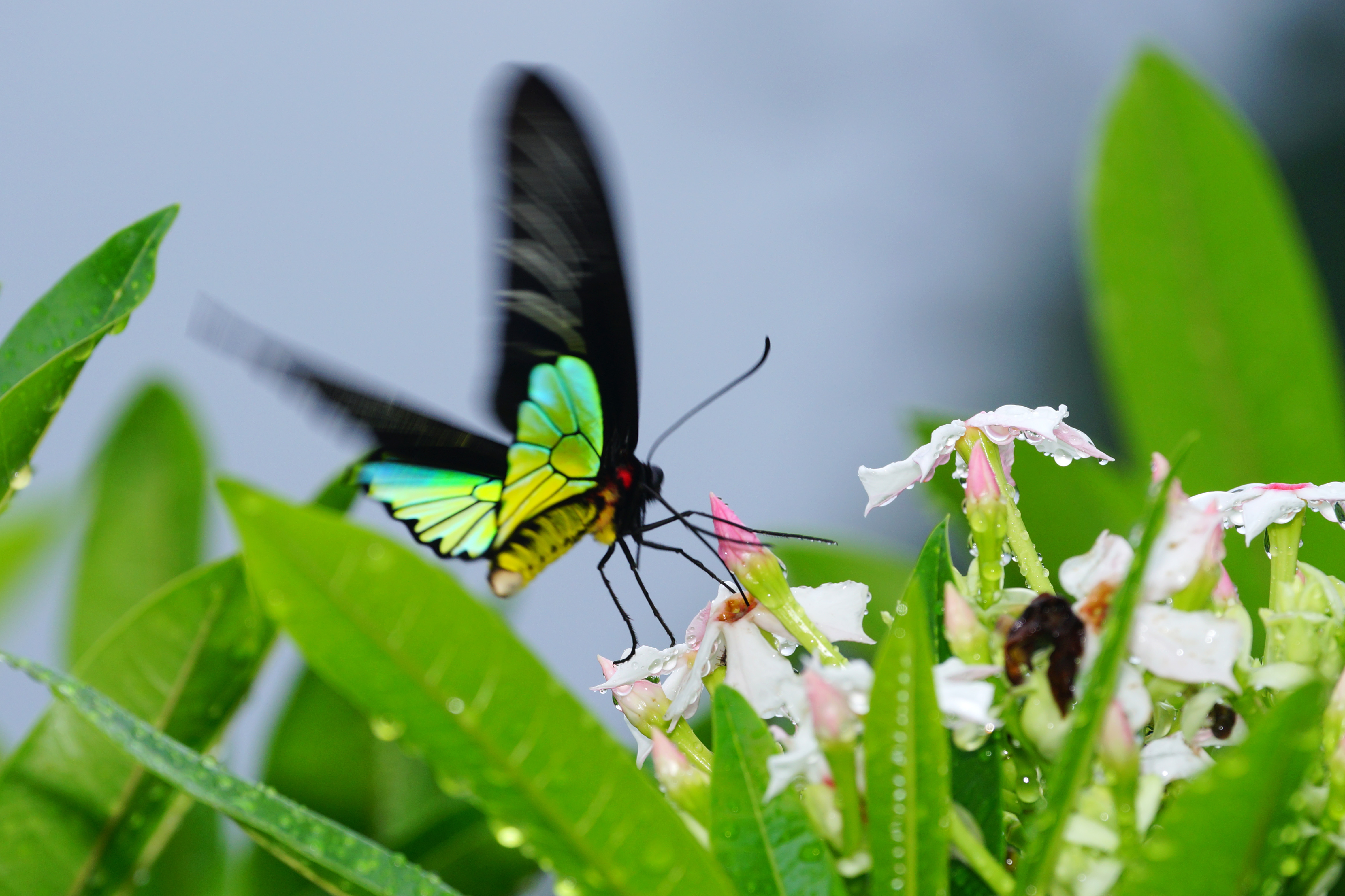 珠光裳鳳蝶 Troides magellanus sonani